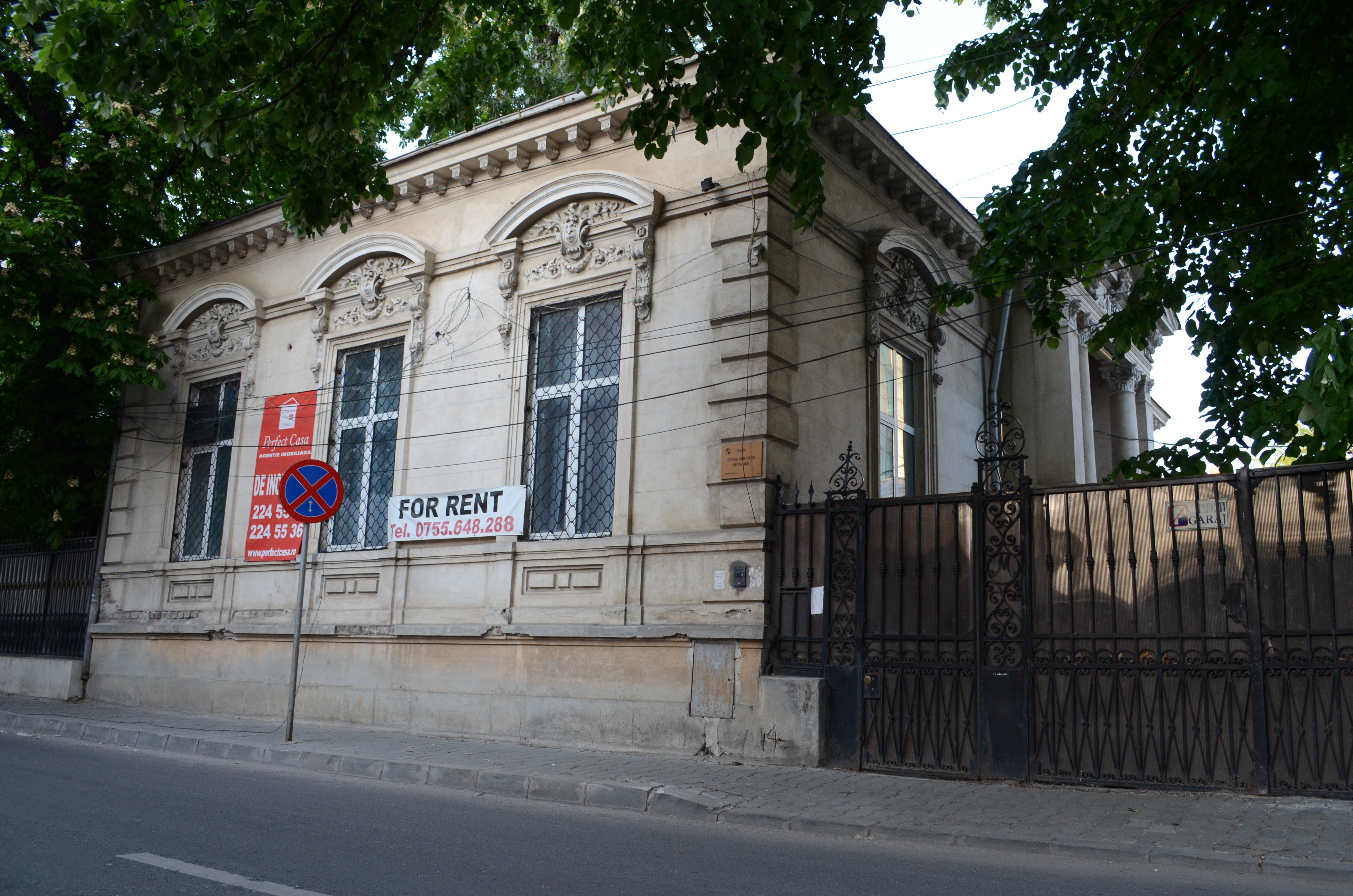 Casă, Strada Romulus nr. 55, Sector 3, București